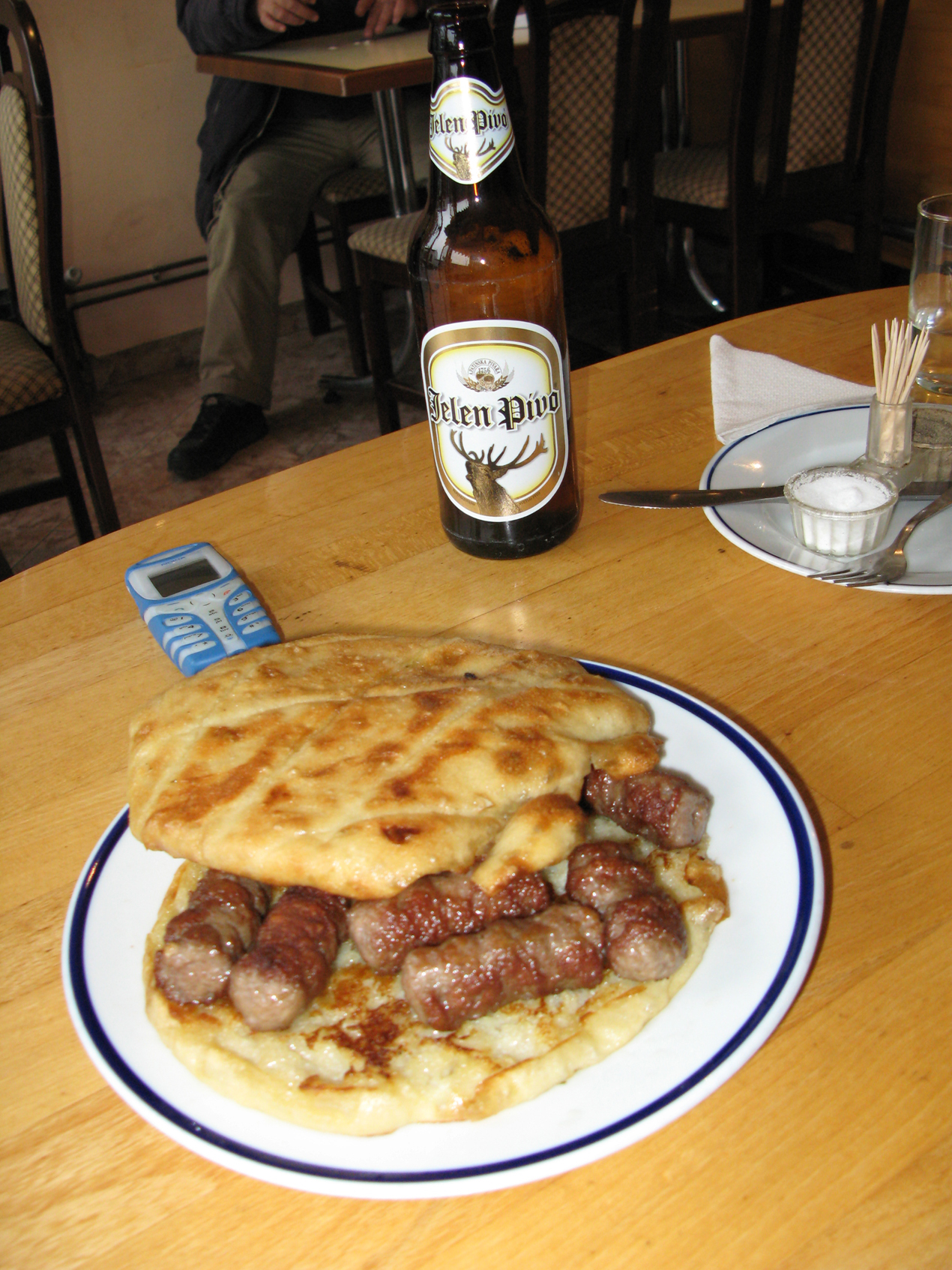 Ћевапи у лепињи.